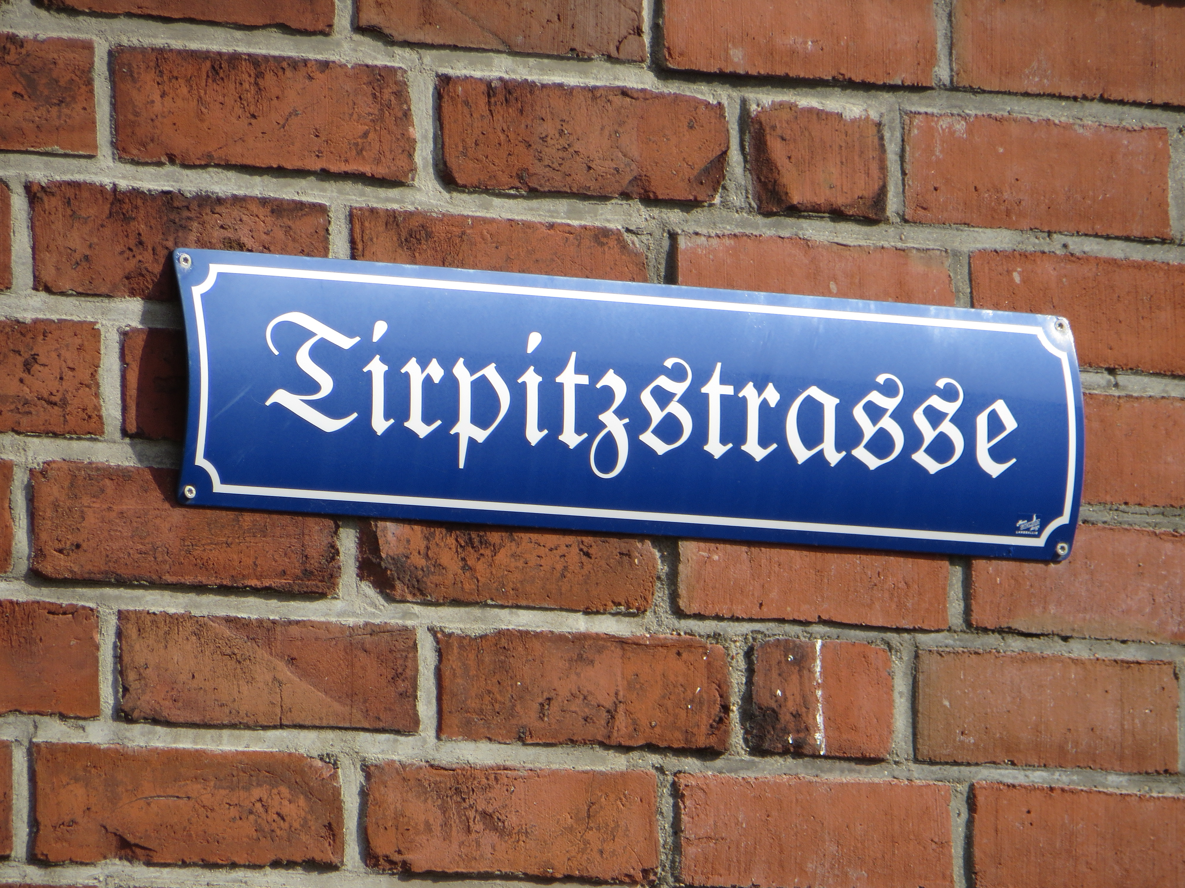 Tirpitzstraße 40 (Flensburg 2015), weiteres Bild